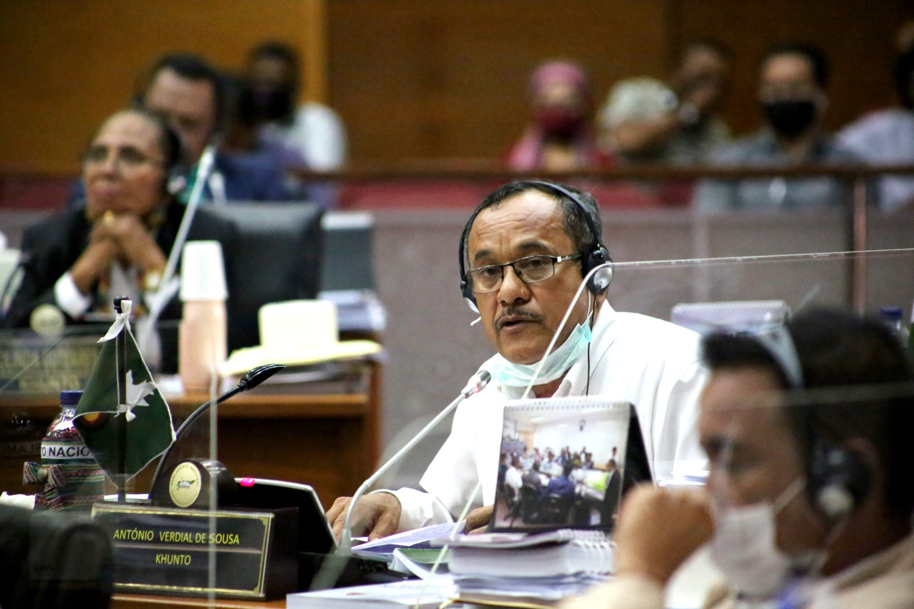 António Verdial de Sousa in der Sitzung zur Verlängerung des Ausnahmezustandes im Nationalparlament Osttimors